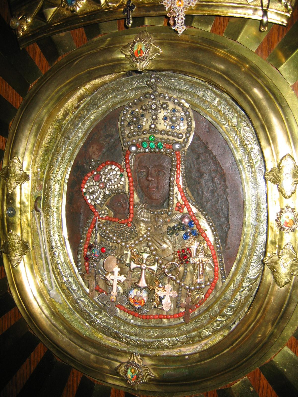 Главная святыня Леснинской обители: Леснинская икона Божией Матери.